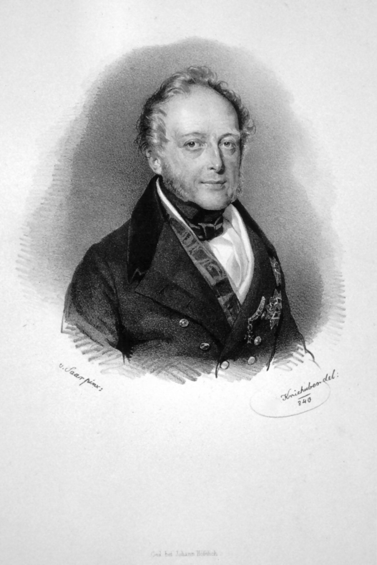 Rudolf Lützow (1779-1852), Diplomat Lithographie von Josef Kriehuber, 1840